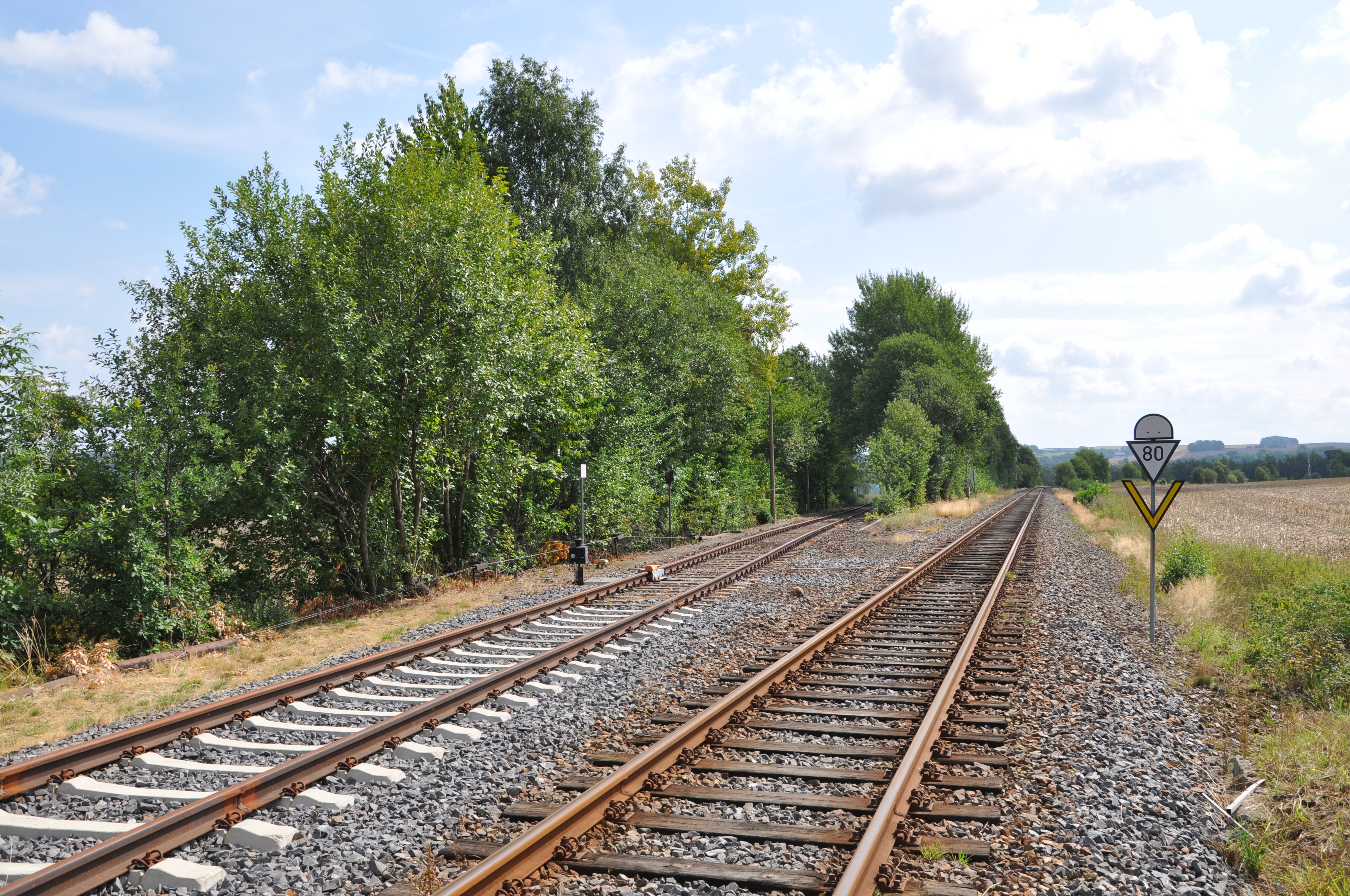 Bahnhof Berthelsdorf (Erzgeb), Anschlussbahn der Papierfabrik Unterwellenborn Schöller Technocell. Das Gleis wird seit 2015 nicht mehr befahren. Die Logistik der Papierfabrik wird seitdem per LKW über die Straße abgewickelt.